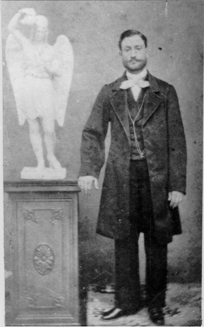 "A 1 año de la inauguración oficial del MuBo -Museo de Bomberos de Chile-, les presentamos una foto poco conocida de nuestro primer Mártir, German Tenderini, posando con una de sus esculturas. Murió en 1870 en el incendio del Teatro Municipal. Hoy, una de sus calles laterales lo recuerda. Patrimonio puro". German Tenderini y Vacca (Carrara, Toscana, 1828 - Santiago, 8 de diciembre de 18701 ) fue un artista, filántropo y comerciante italiano radicado en Chile y el primer mártir del Cuerpo de Bomberos de Santiago.